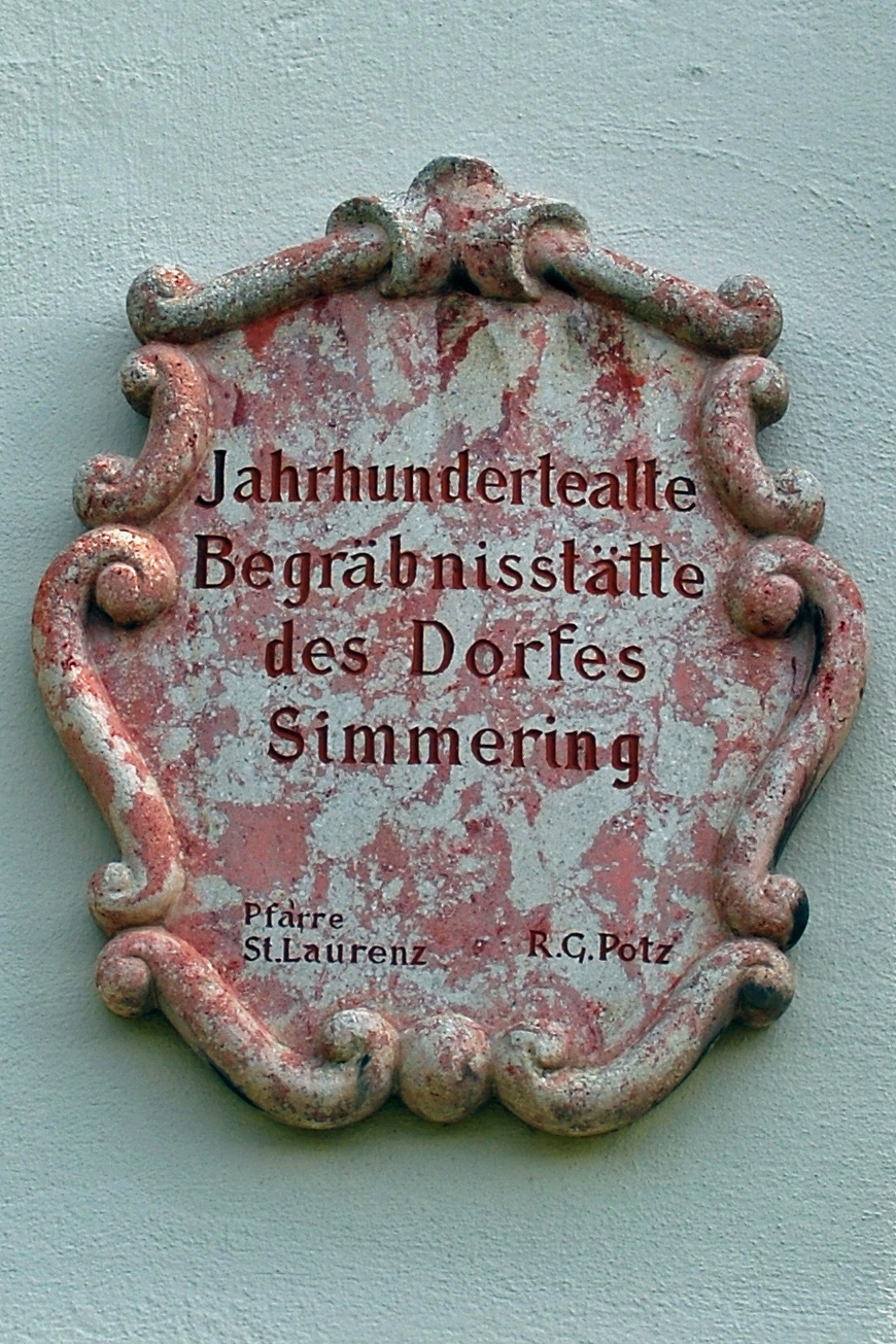 Altsimmeringer Pfarrkirche hl. Laurenz, Kirchenmauer